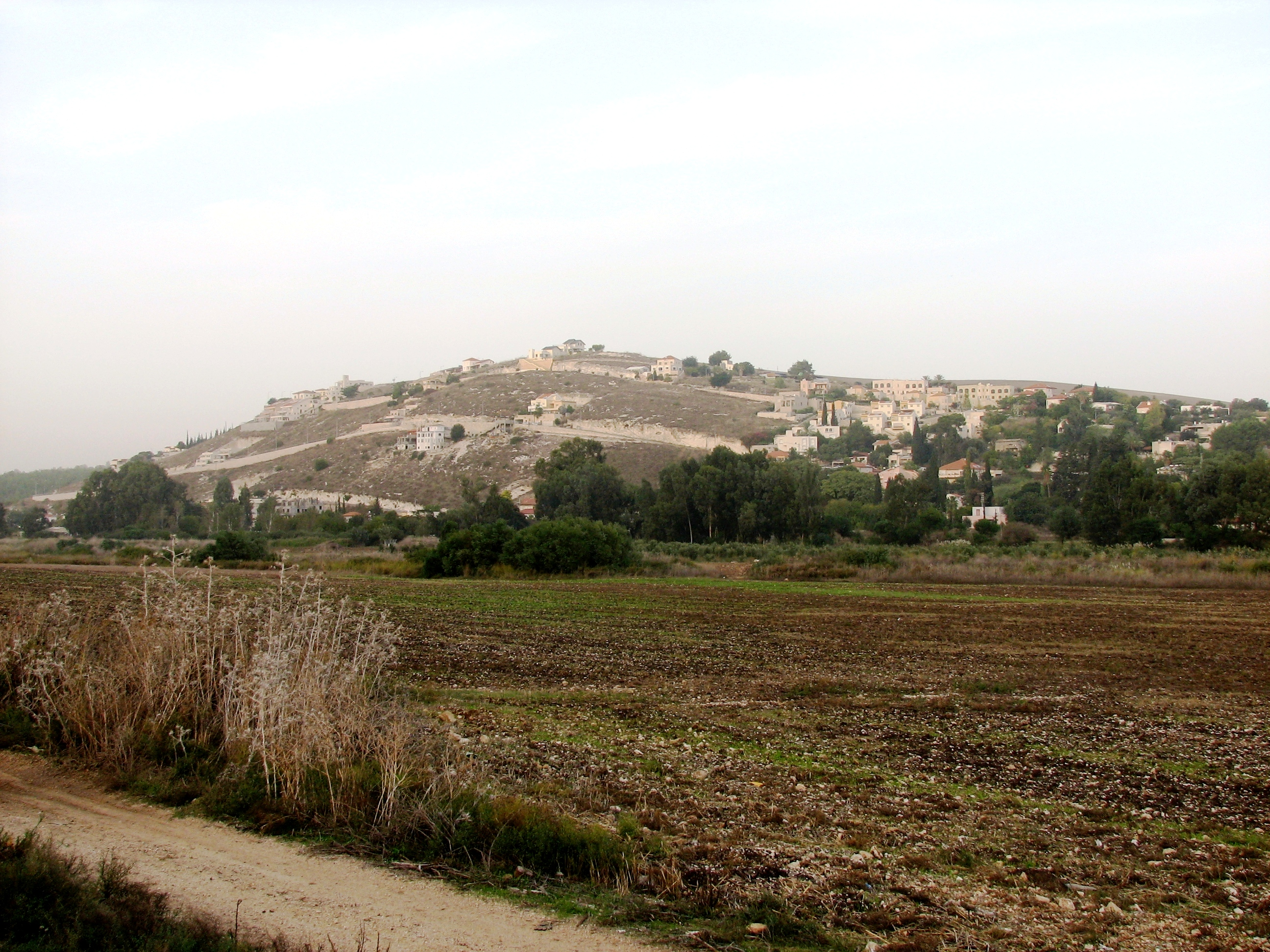 Kiryat Haroshet - Suburb in Kiryat Tivon קריית חרושת שכונה בקריית טבעון